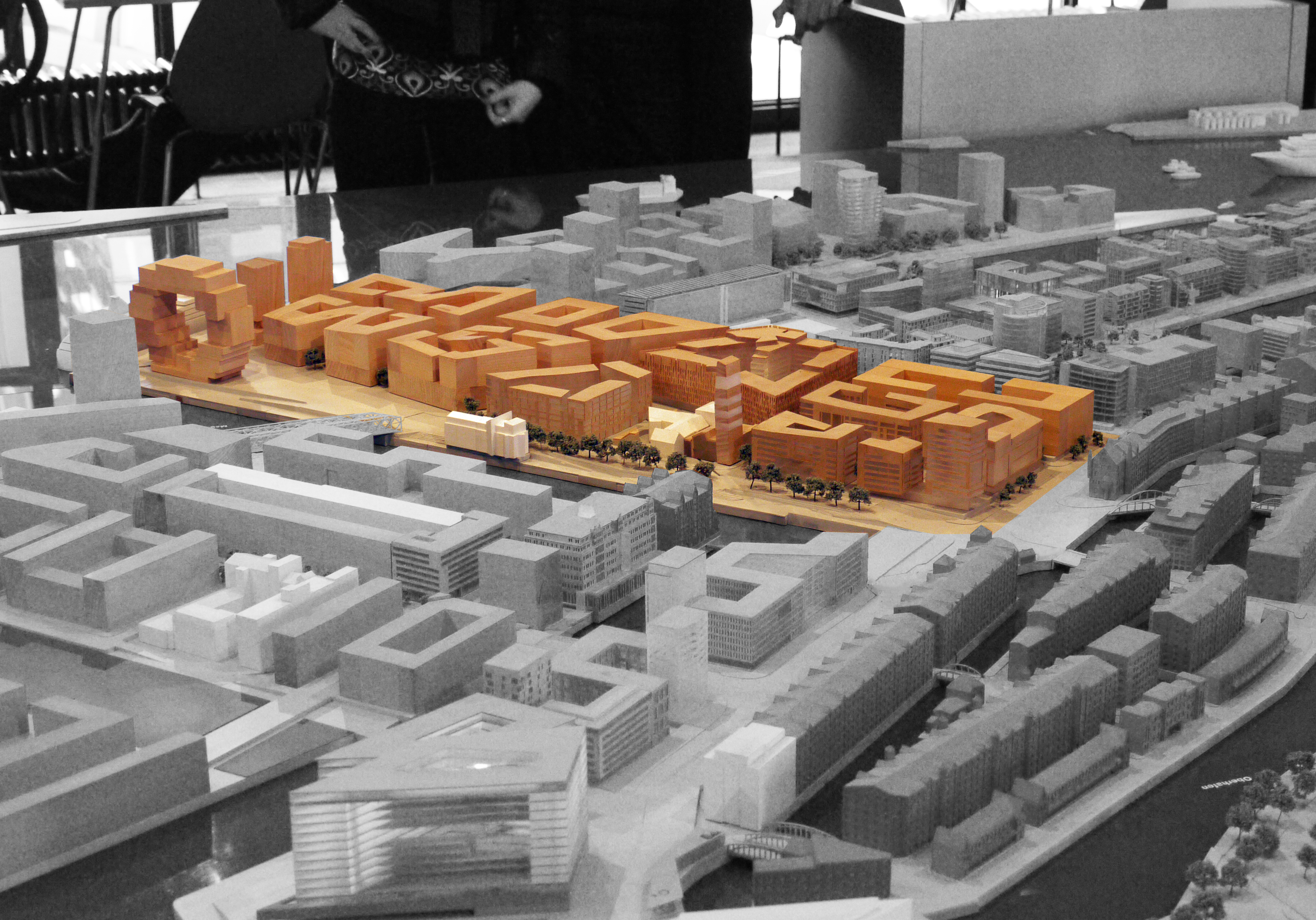 Modell der HafenCity in Hamburg. Im Vordergrund das Überseequartier.